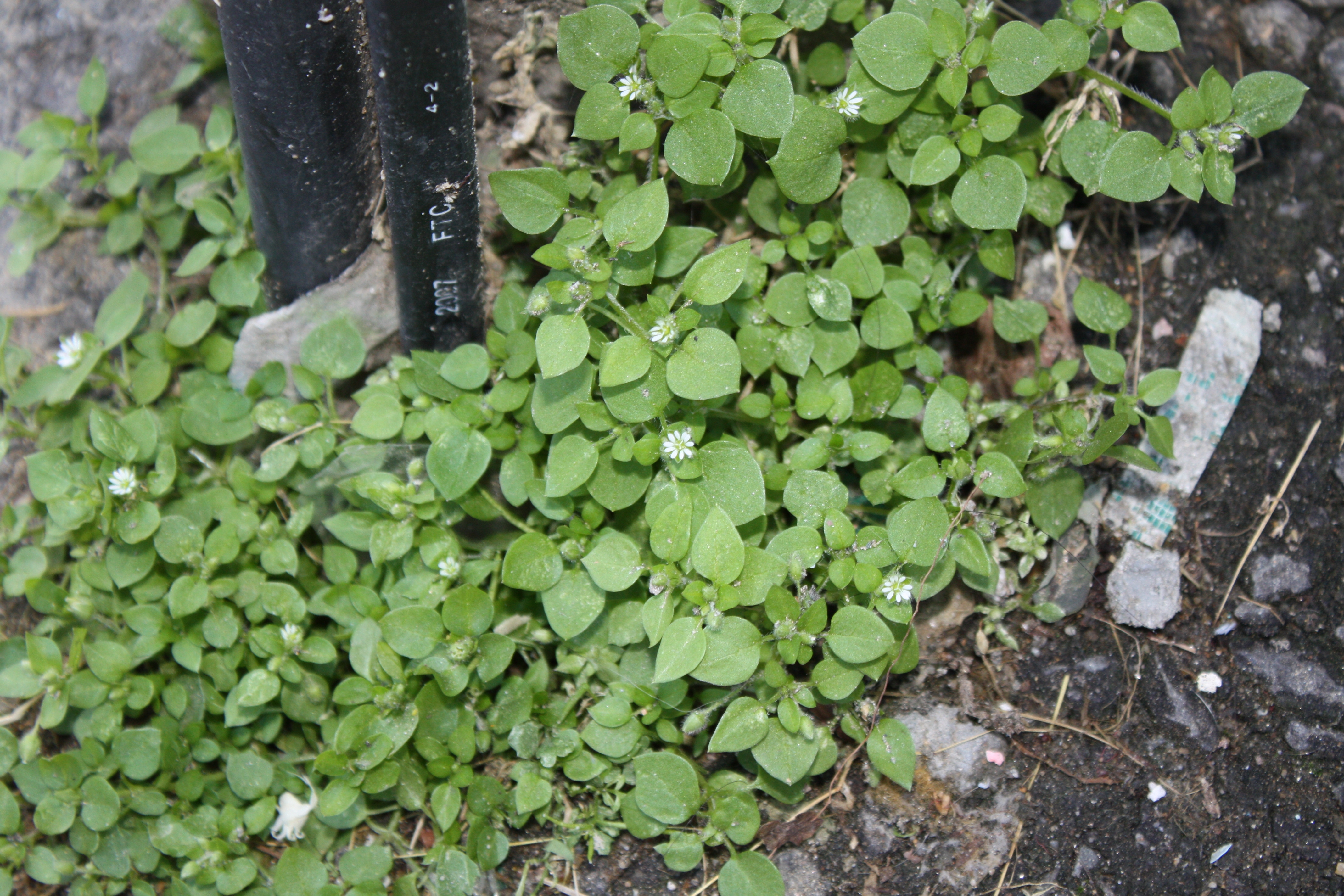 Stellaria media in Bupyung Korea